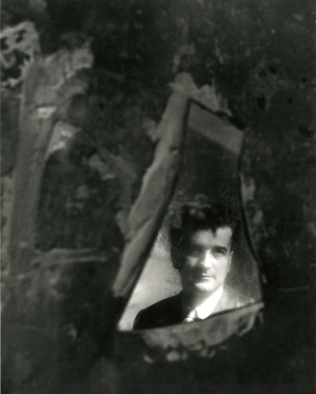 Servizio fotografico : Milano, 1956 / Paolo Monti. - Stampe: 3 : Positivo b/n, gelatina bromuro d'argento/ carta, 24x30. - ((Al verso delle stampe manoscritti i numeri dei negativi corrispondenti secondo altra numerazione: 370, P19; iscrizione didascalica con data manoscritta a matita: "Mario Negri/ 1956"; timbro a inchiostro con copyright: "© Copyright/ Credit to/ Paolo Monti/ Corso Sempione [...]/ Milano". - Le due stampe sono incollate insieme per il lato lungo con nastro adesivo trasparente. - Sul coperchio della scatola iscrizione didascalica manoscritta a pennarello nero: "Ritratti". - Fonte: Monografia: Mario Negri: sculture dal 1955 al '60, Milano, Edizioni del Milione (1962)